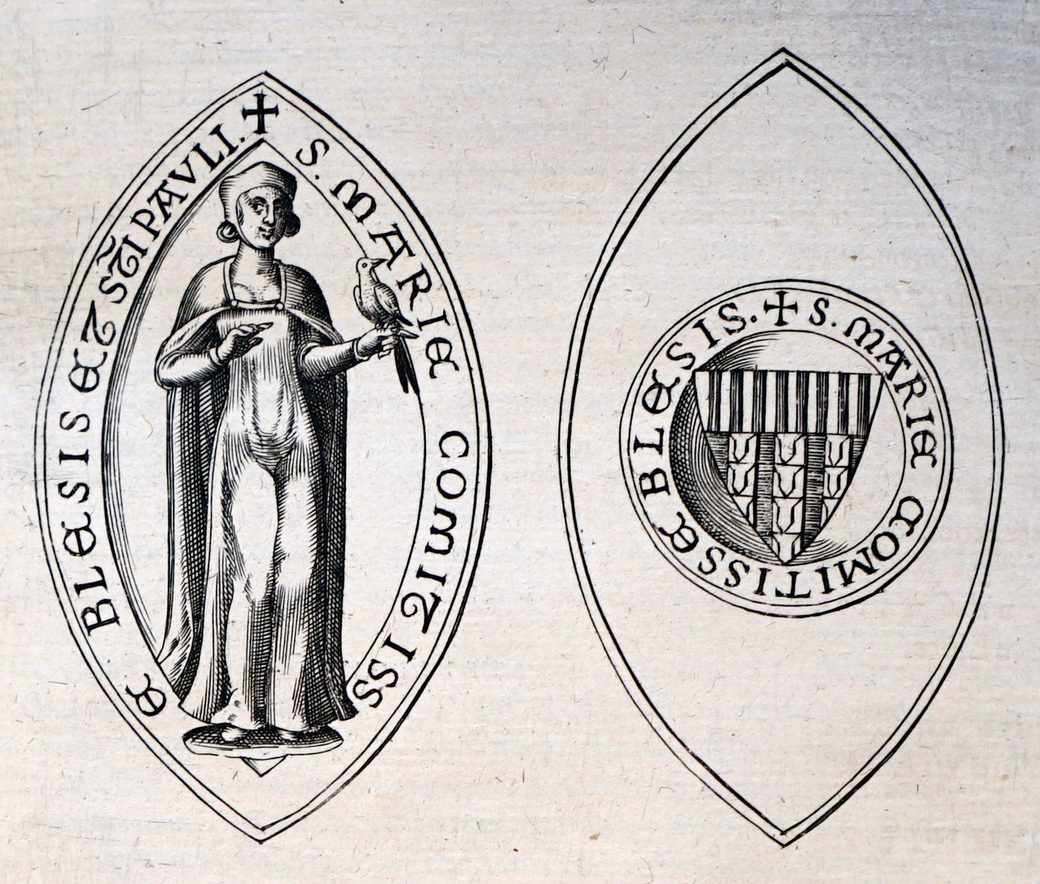 Marie d'Avesne image issue de "histoire de chatillon" par du Chesne.